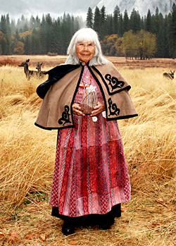 Julia Parker, Kashia Pomo Basketmaker